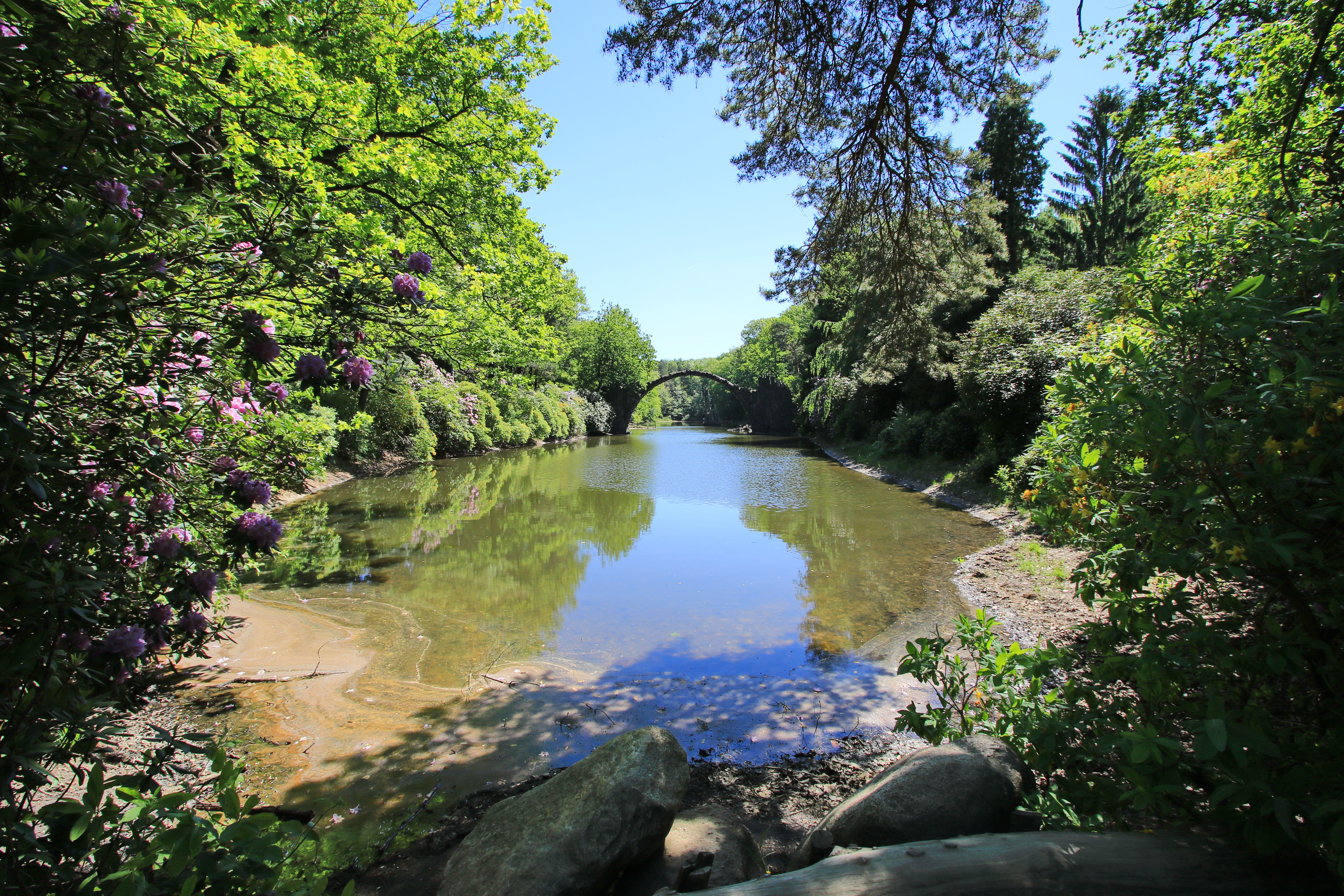 Rakotzbrücke im Azaleen- und Rhododendronpark Kromlau. Diese Datei zeigt das sächsische Kulturdenkmal mit der ID 09303000